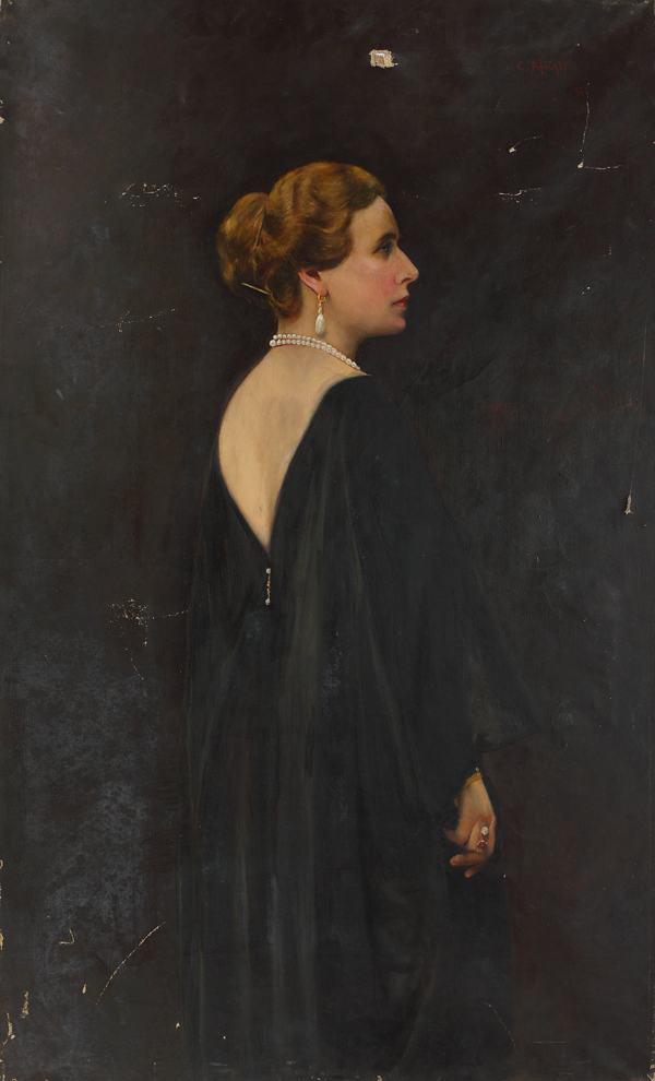 Constantin Pascali (1860-1924) - Regina Maria, Dimensiuni: 141,5×85 cm, Tehnica: ulei pe pânză, Detaliu semnatura: semnat dreapta sus, cu roşu C. Pascali